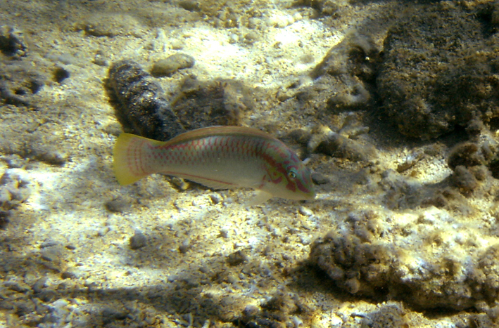 Labre zig-zag (Halichoeres scapularis